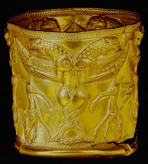 جام هیولای دو سر و غزال متعلق به تمدن مارلیک گیلان